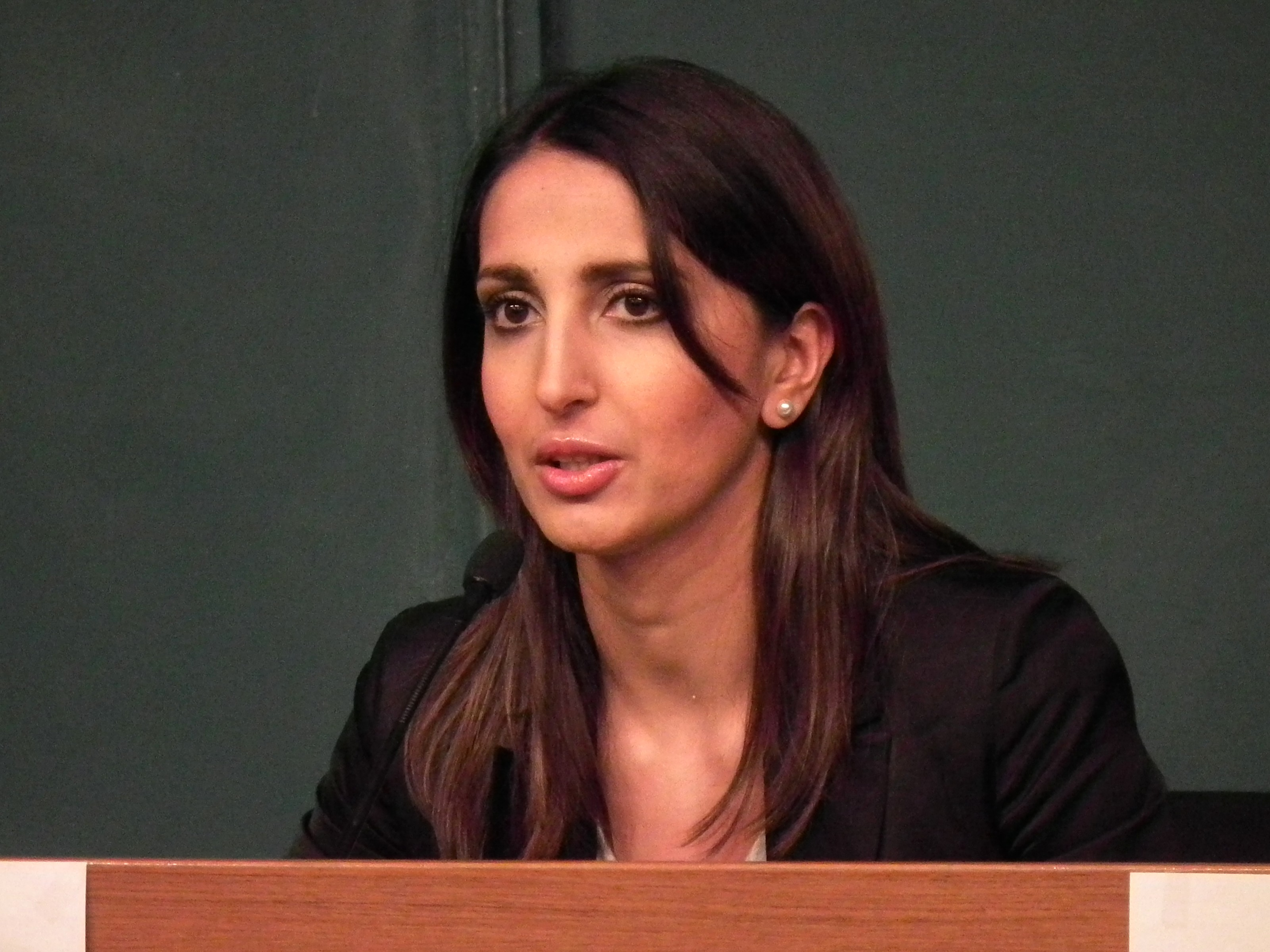 Nasima Razmyar, kansanedustajaehdokas, vuoden pakolaisnainen 2010